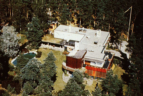 Vista Aerea Villa Mairea